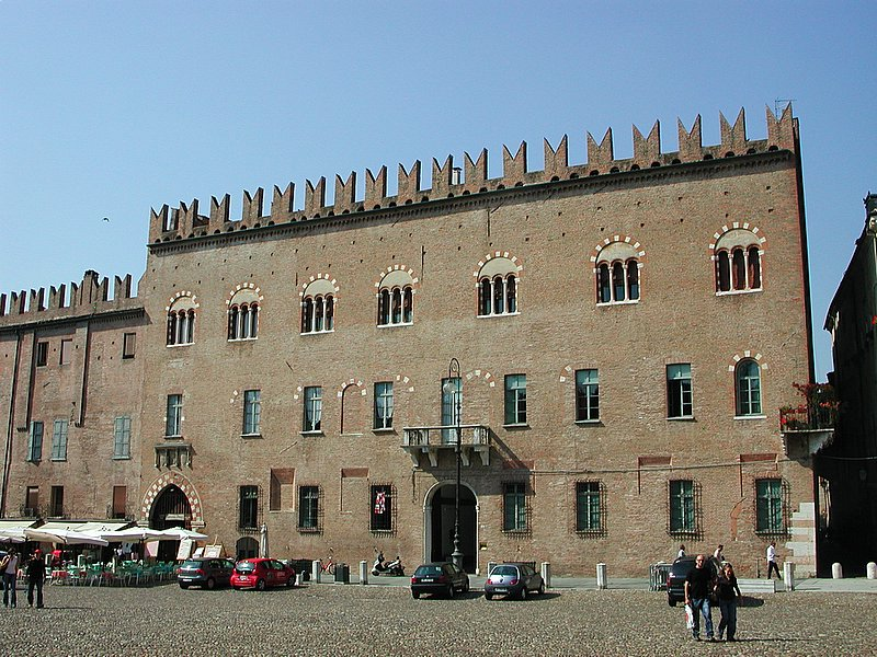 Palazzo Castiglioni Bonacolsi a Mantova. Source: photo uploaded by User:RicciSpeziari. Photographer: Riccardo Speziari